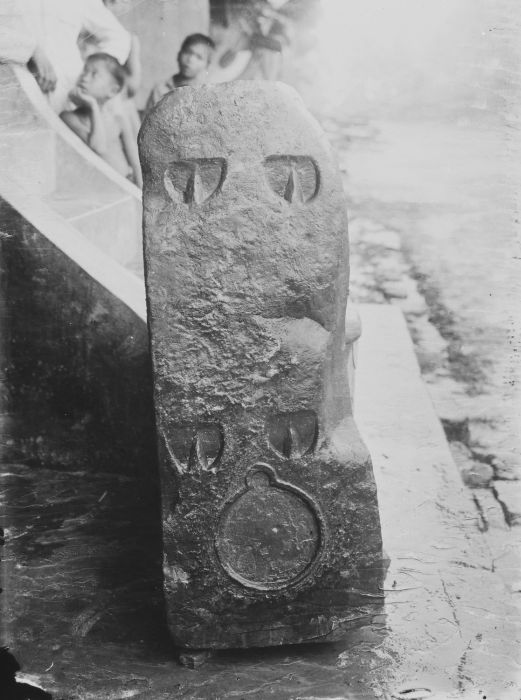 foto. Een megaliet met inscripties in een dorp op Nias